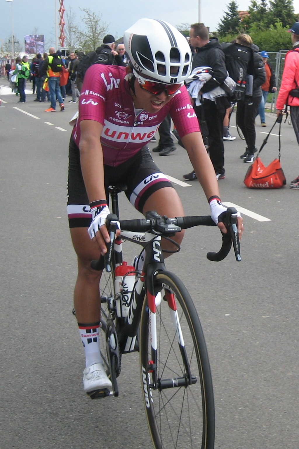 Na de finish van de Amstel Gold Race Ladies Edition 2017.